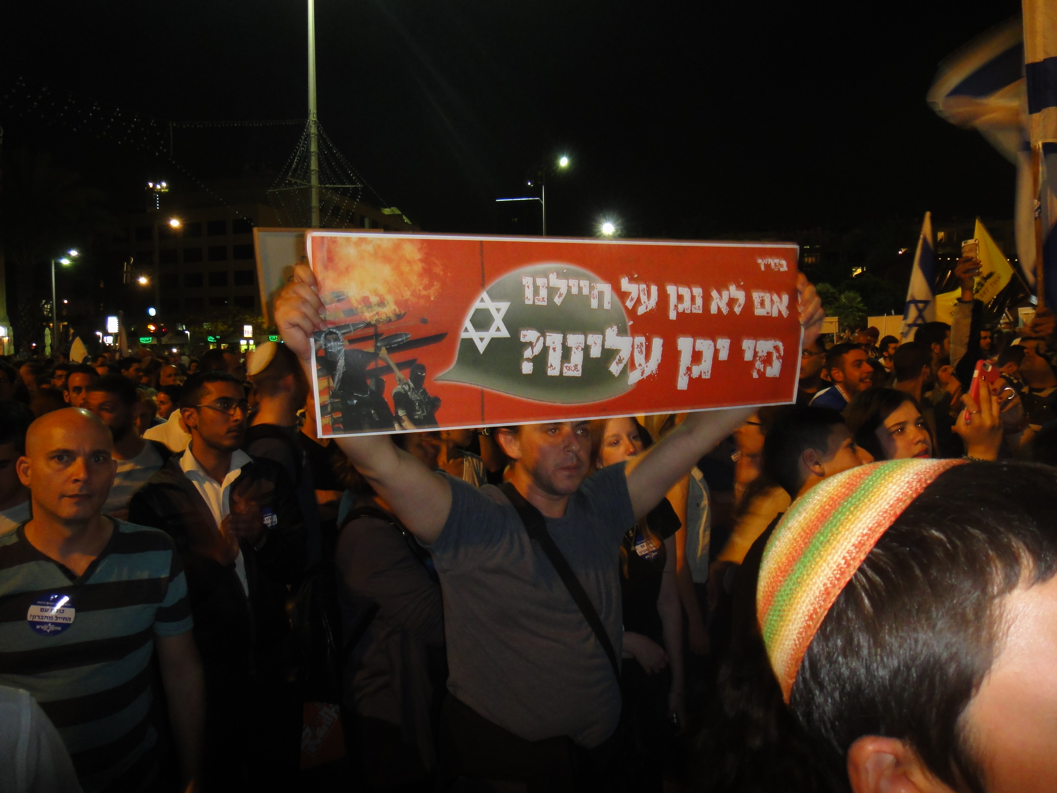 עצרת בכיכר רבין, לתמיכה בחייל צה"ל.